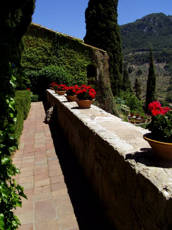 Taras w celi klasztoru kertuzów w Valldemosa na Majorce